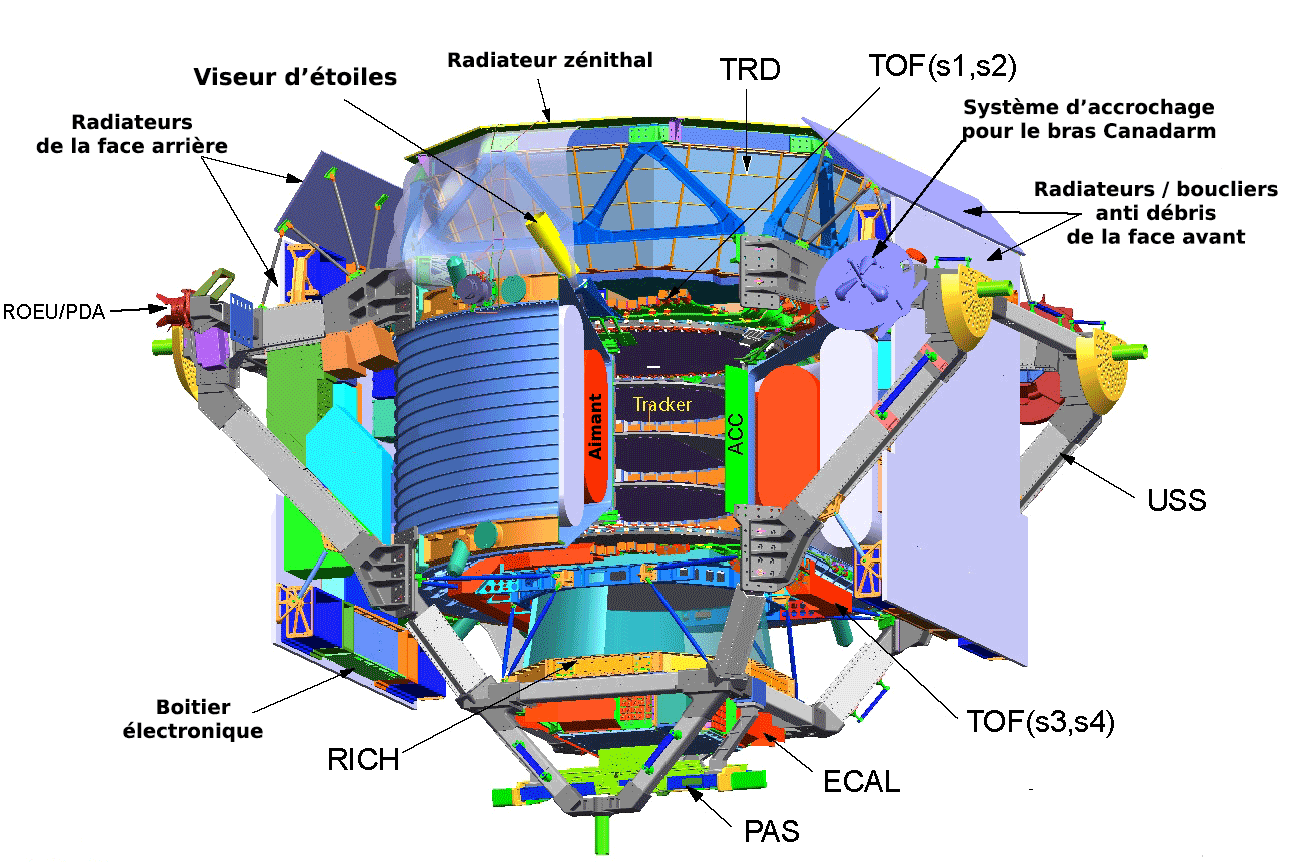 Schéma du Spectromètre magnétique alpha (version francisée)